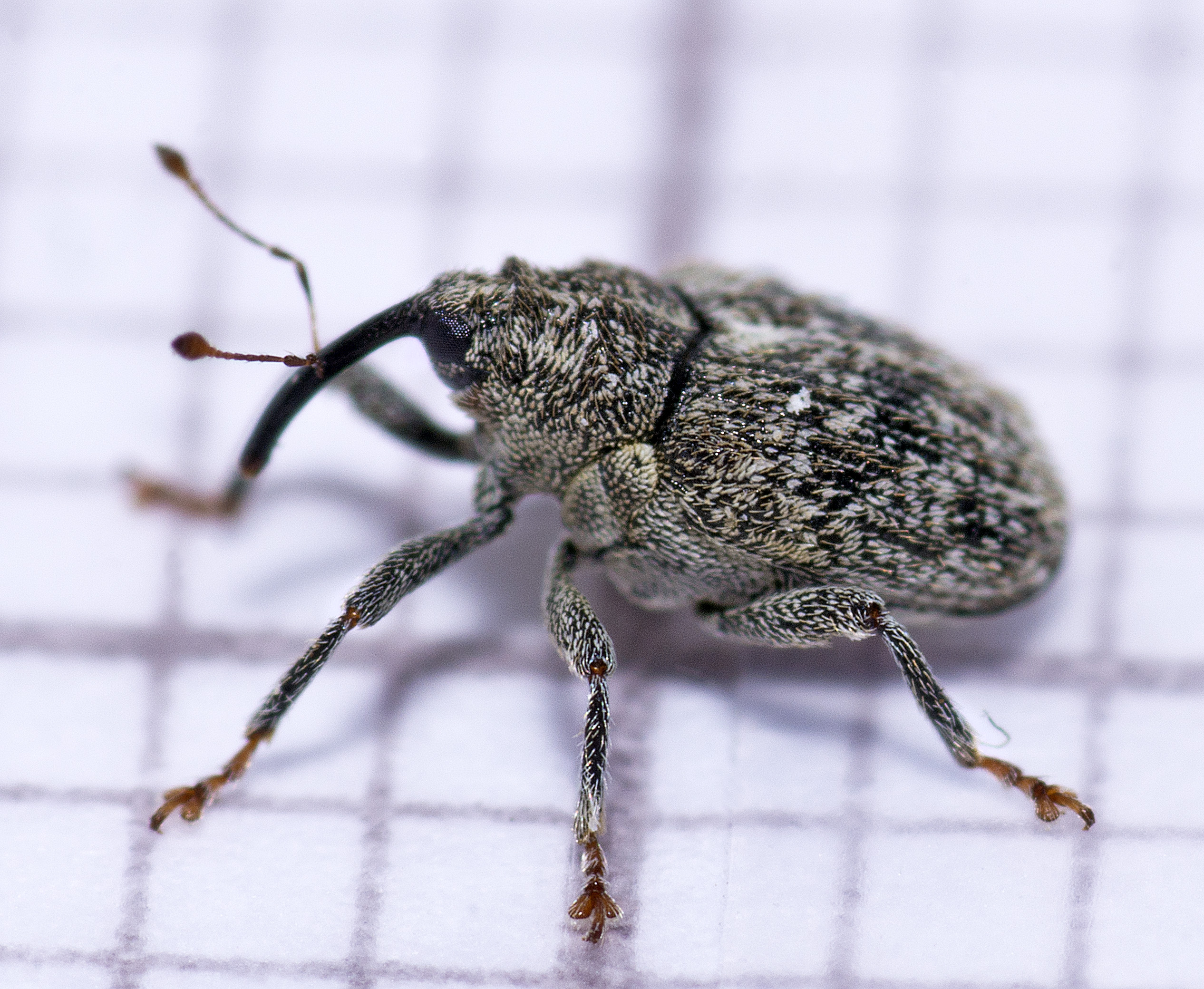 Ceutorhynchus pallidactylus